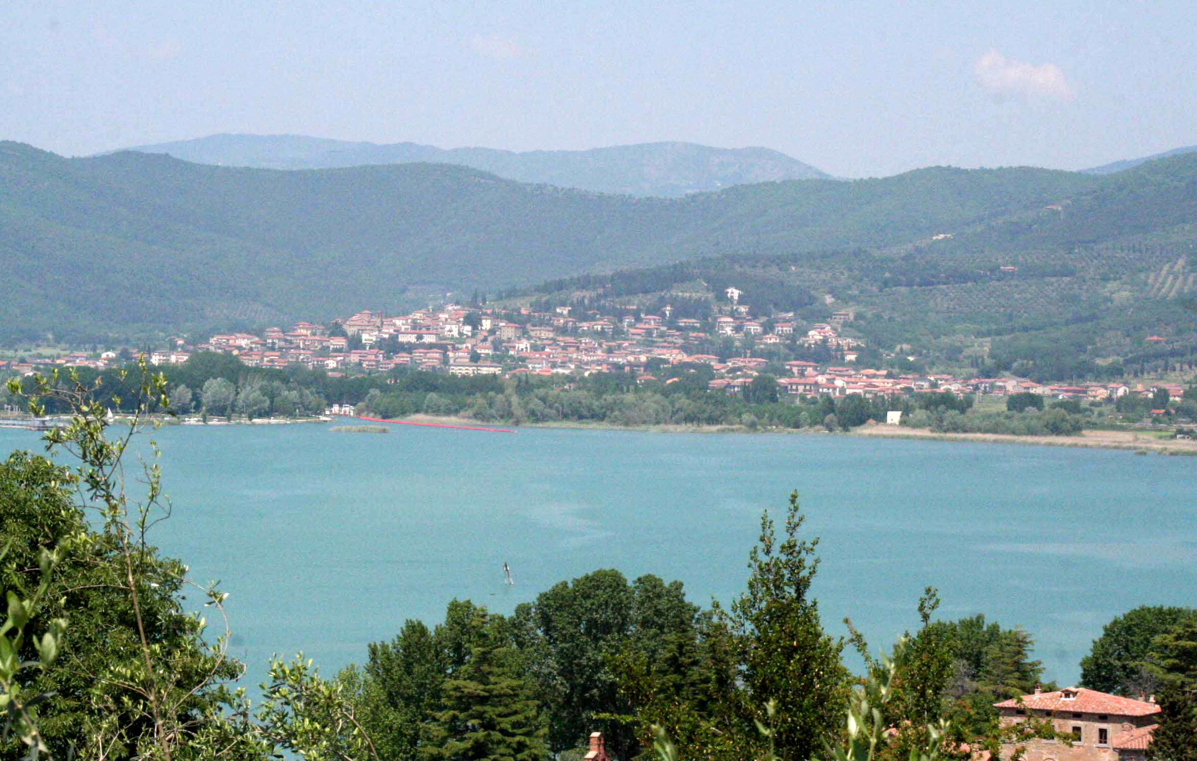 Tuoro